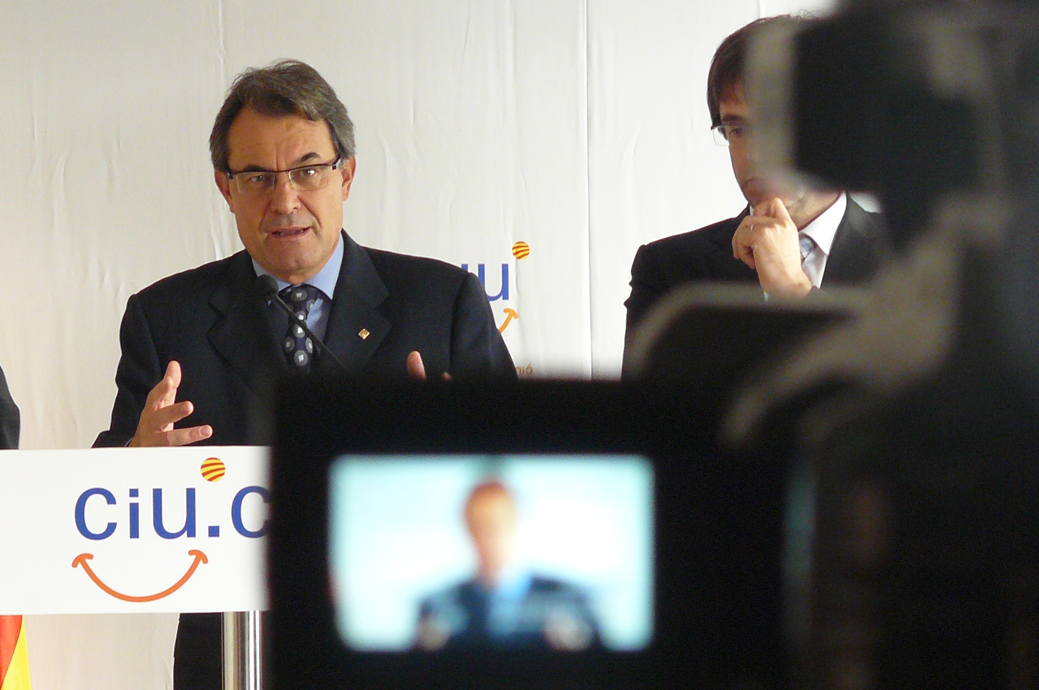 Artur Mas, Oriol Pujol i Carles Puigdemont en roda de premsa a Girona.